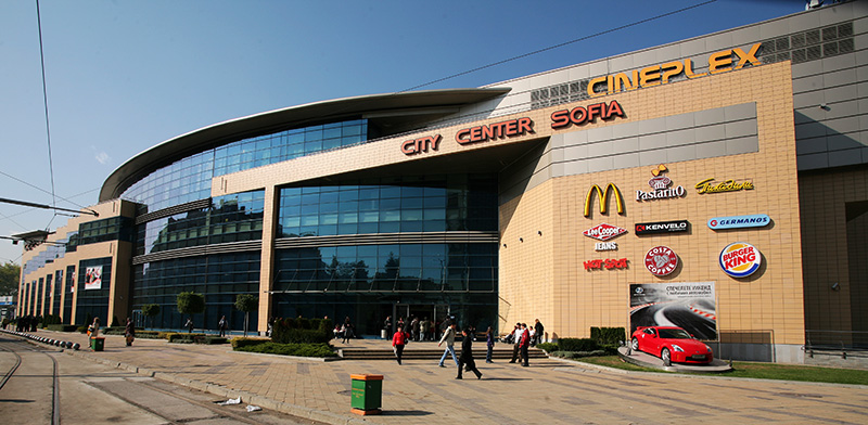 Парк Център София или City Center Sofia